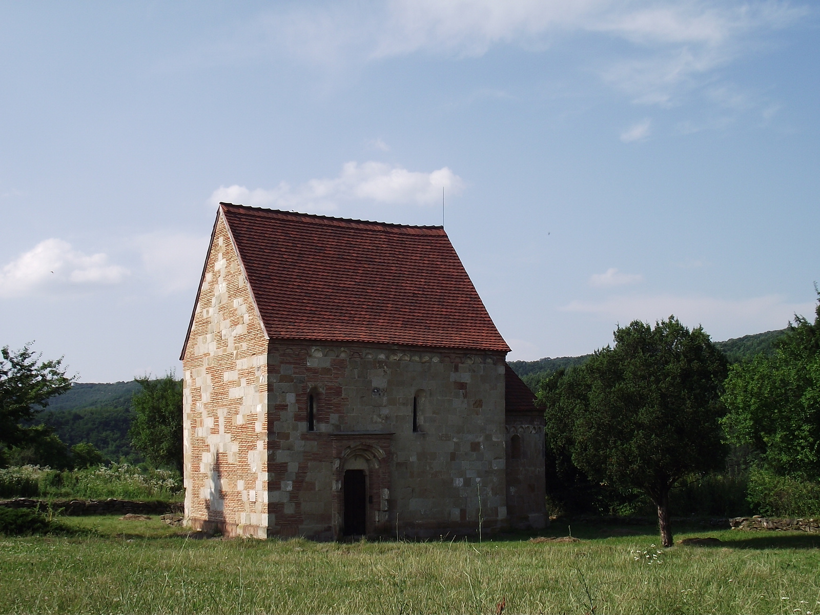 R. k. templom (Magyarok Nagyasszonya) (Váraszó, Rákóczi u.) This is a photo of a monument in Hungary, Identifier: 5876